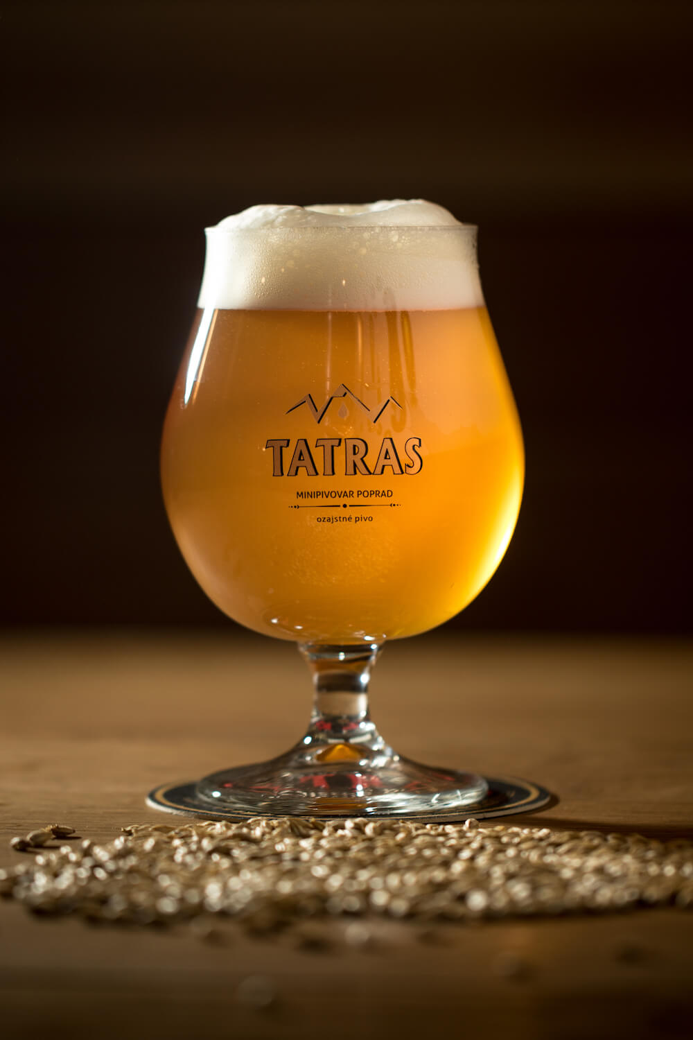 TATRAS IPL 15°